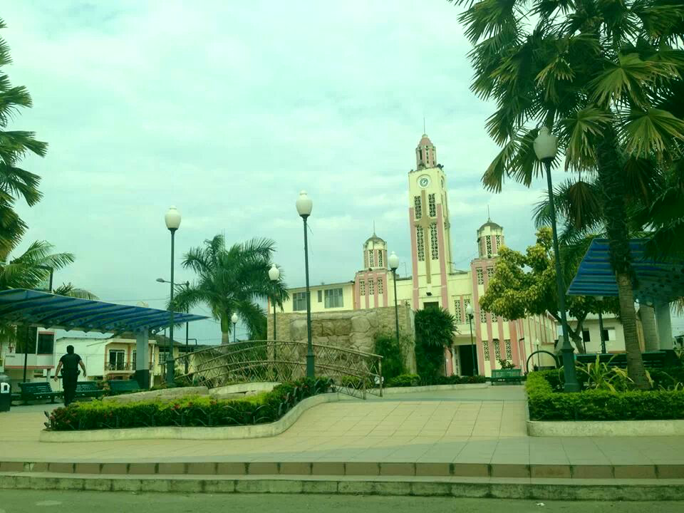 parque central de arenillas